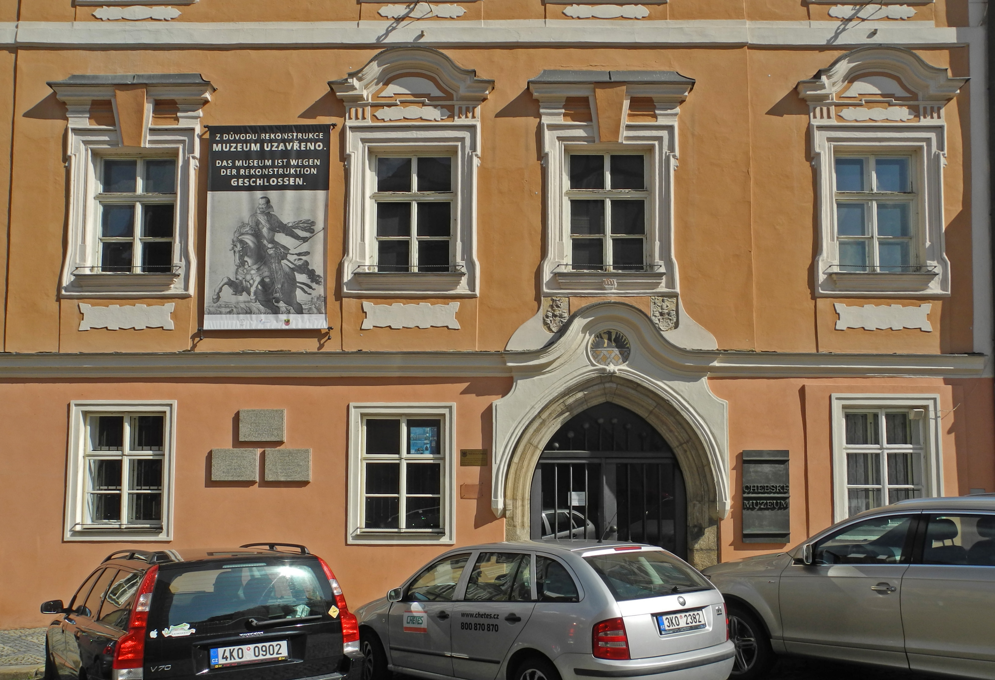 Pachelbelhaus am Marktplatz in Eger – Cheb, nám. Krále Jiřího z Poděbrad 492/3